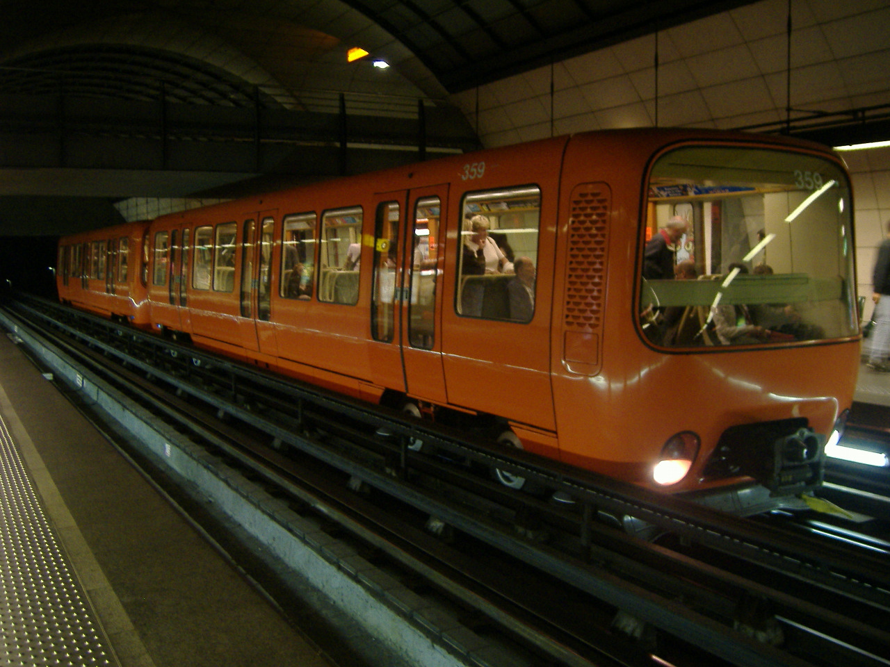 Rame 359-360 (30) à Vieux-Lyon Cathédrale St Jean